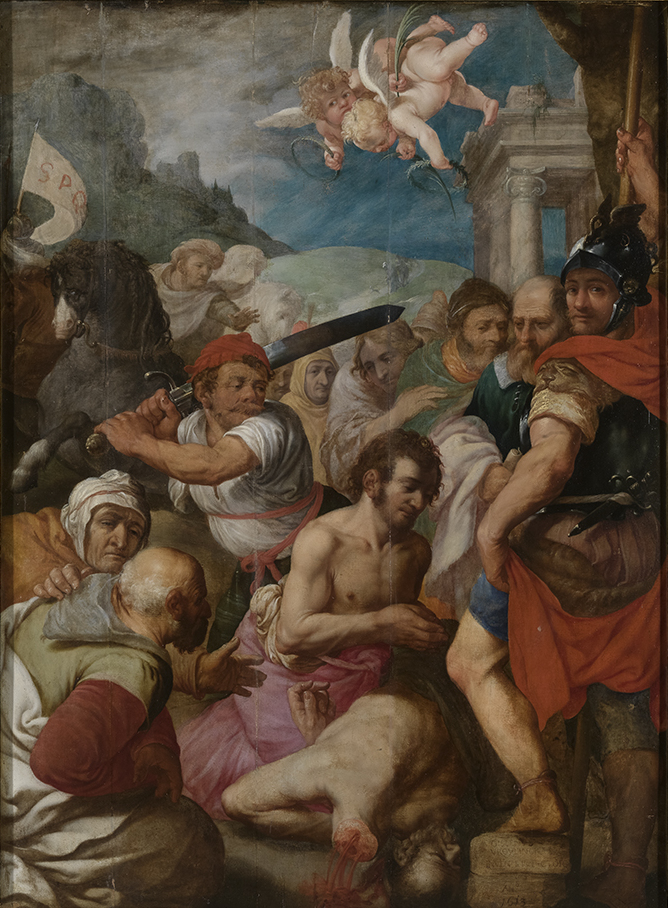 Marteldood van de heiligen Crispinus en Crispinianus (Ghislain Vroyelinck, 1613); collection: Musea Brugge - Groeningemuseum